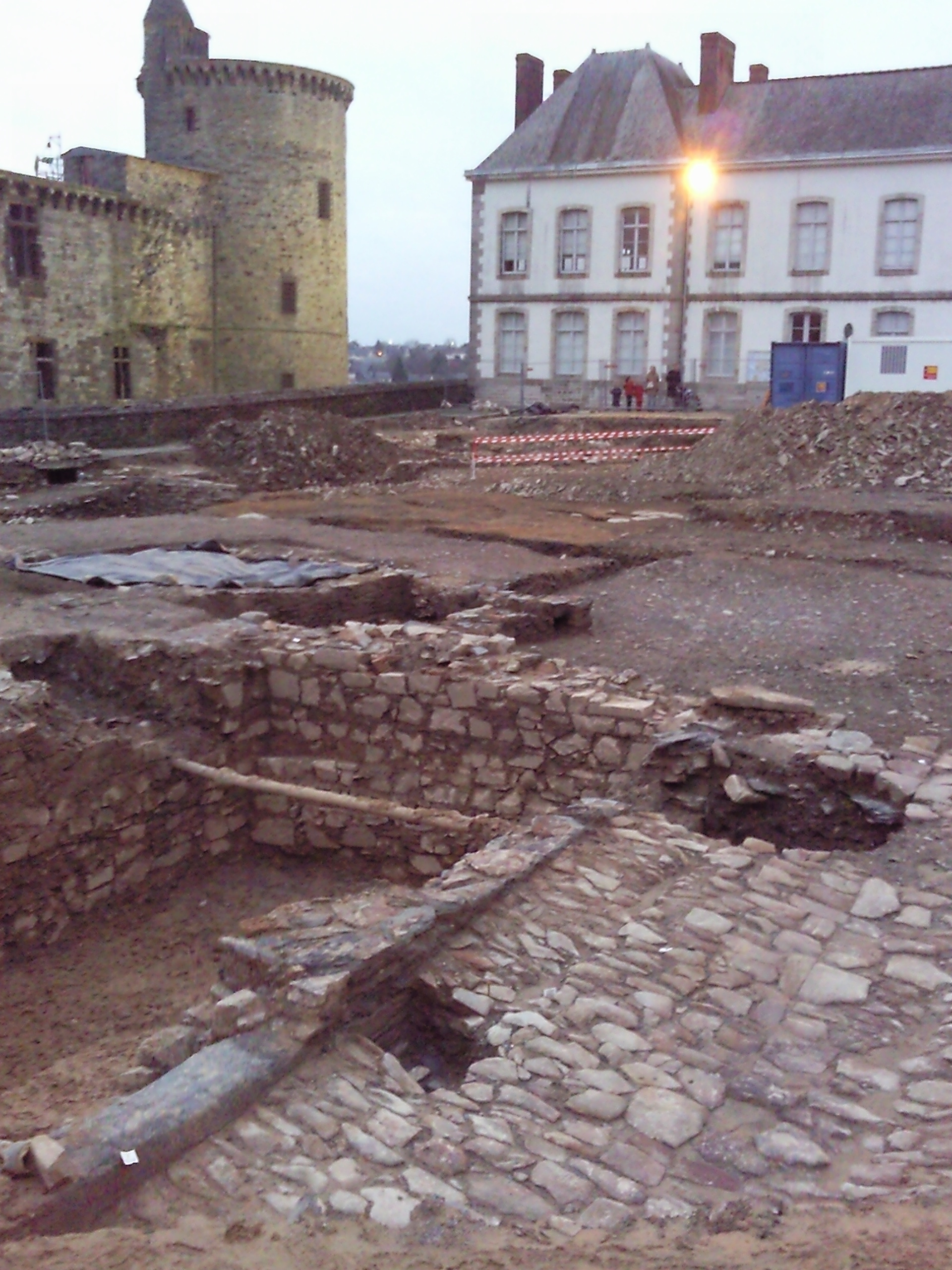 Fouilles archéologiques sur la Place du Château de Vitré préalable à un aménagement. Au premier plan, on peut distinguer une rue pavée qui semble être antérieure au XVe siècle. On peut voir également les soubassements des habitations le long de cette voie. Cette découverte sous-entend une urbanisation très ancienne sur ce que l'on croyait être l'Avant-Cour du Château. Les maisons médiévales vitréennes s'étendaient donc jusqu'au pied du château.